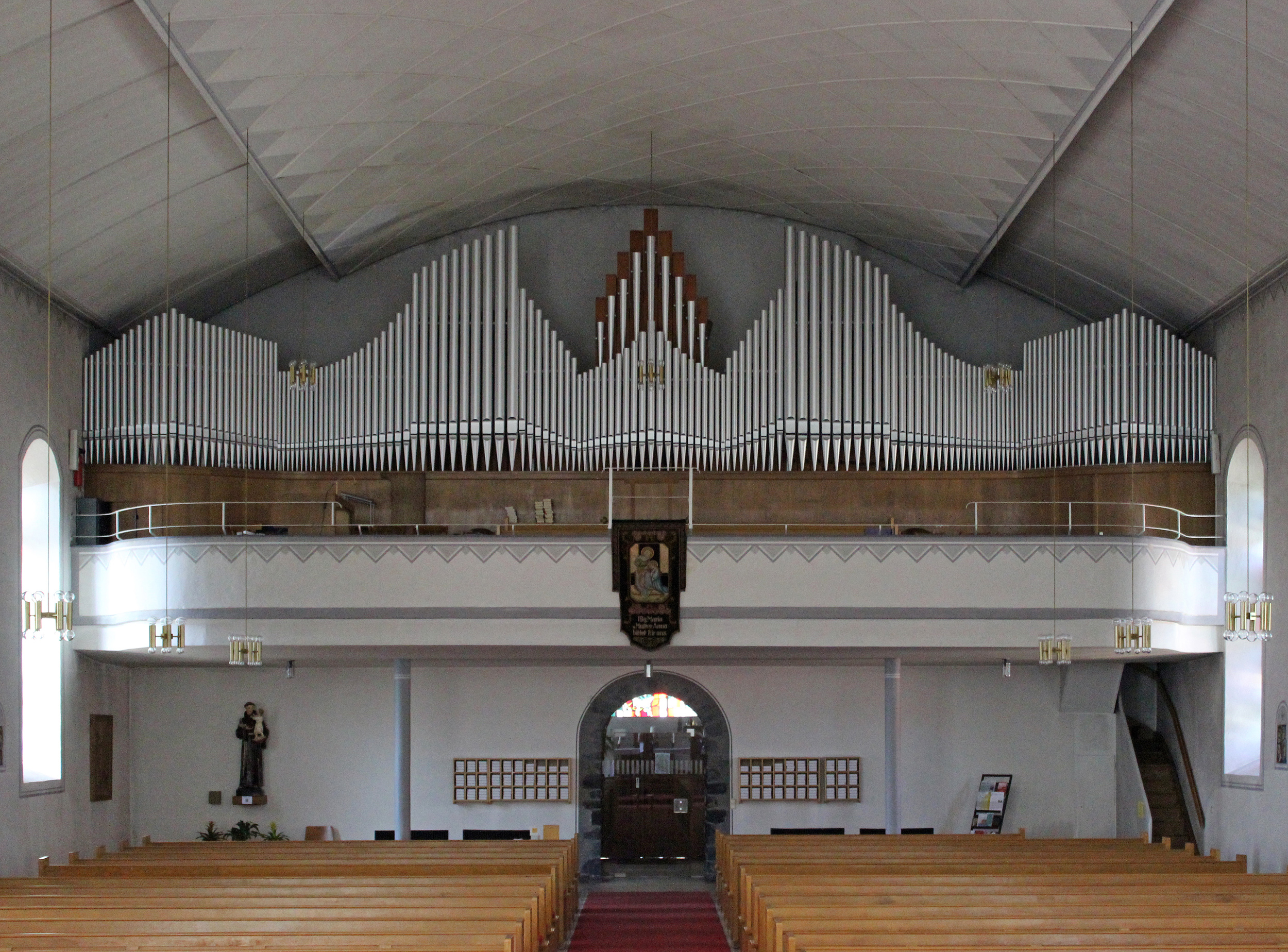 Orgelempore der katholischen Pfarrkirche St. Katharina, Oberkirchen, Gemeinde Freisen, Landkreis St. Wendel, Saarland